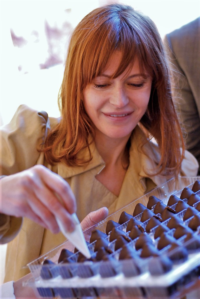 Axelle Red in een chocolaterie